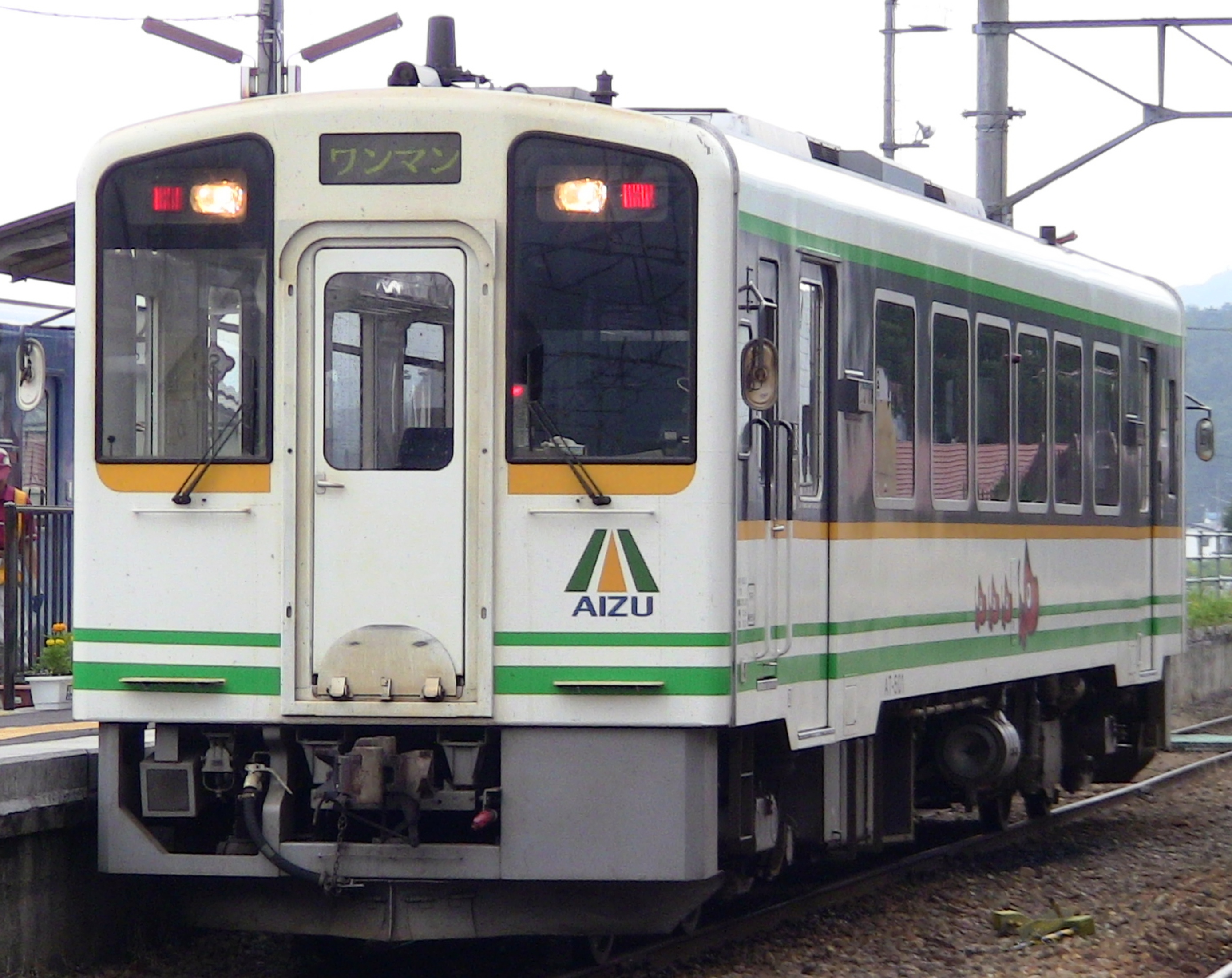 会津田島で撮影